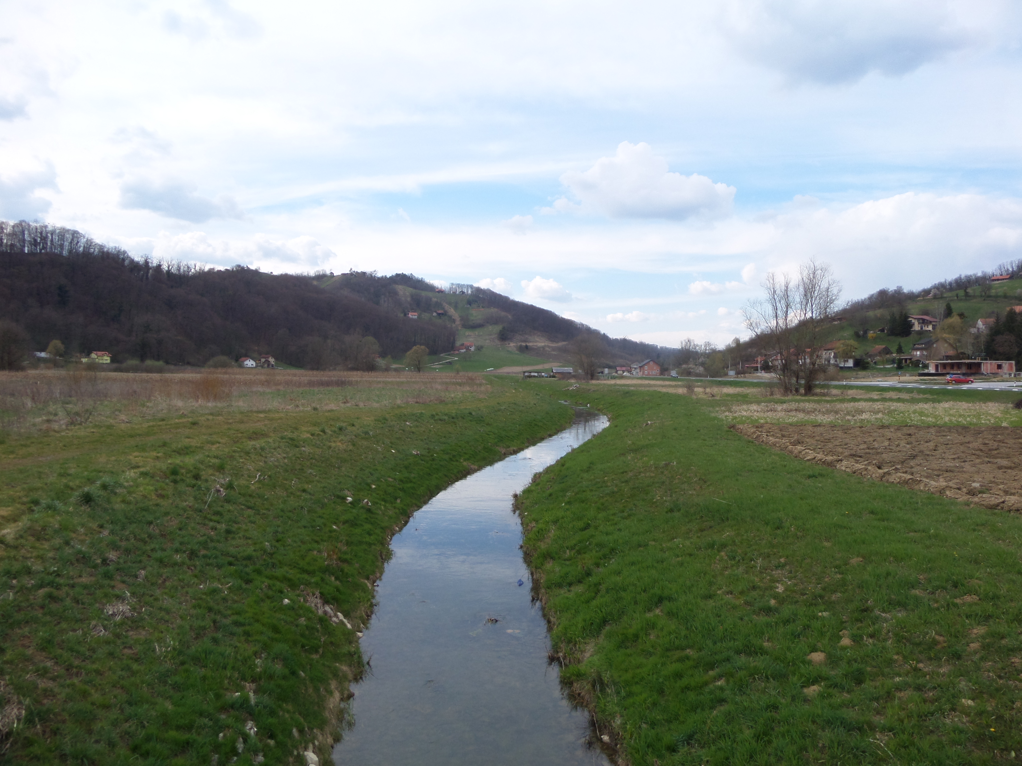 05.04.2015. _ Krapinske Toplice _ Klokovec, HR